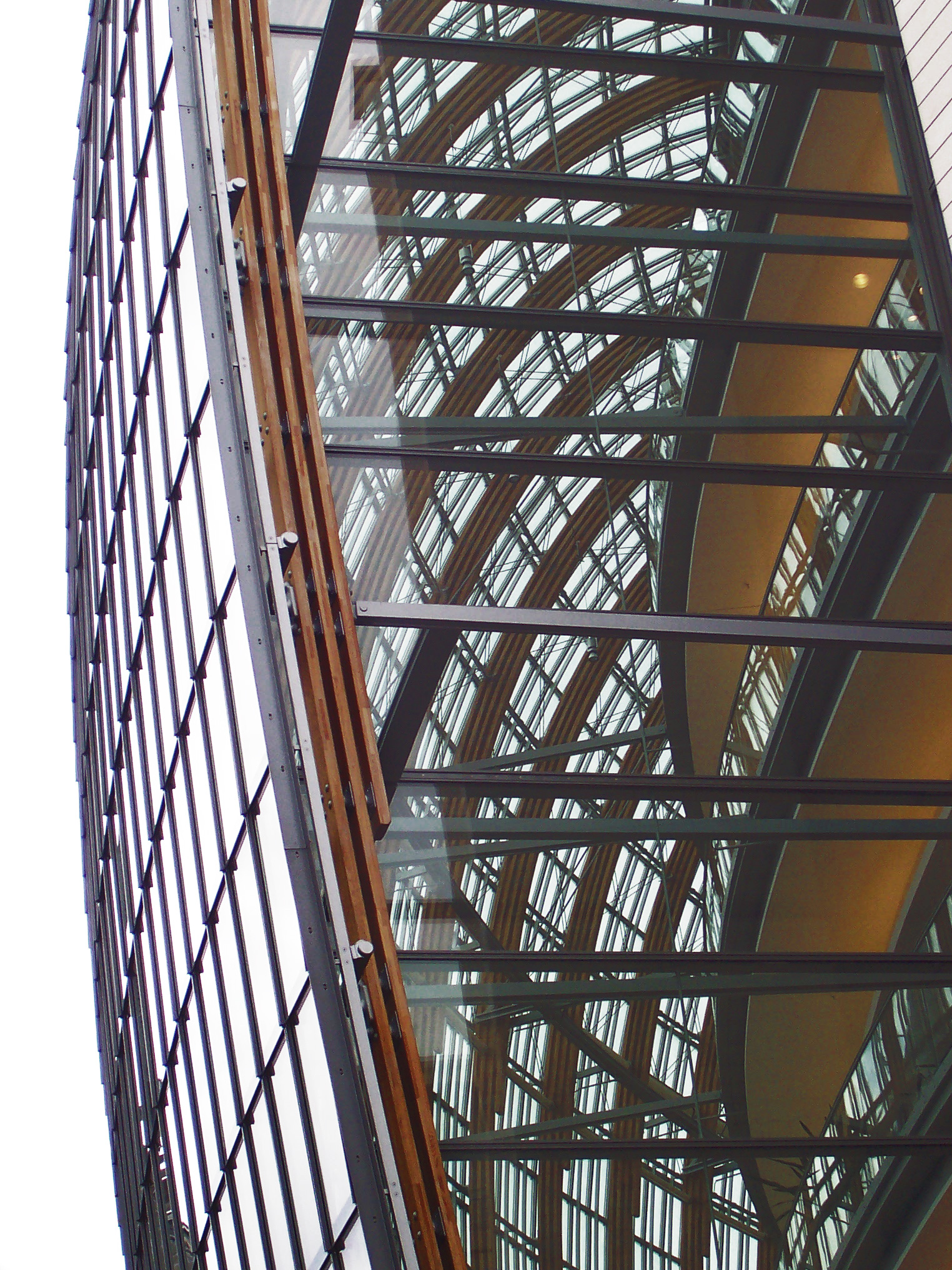 5. Weltstadthaus, Kaufhausgebäude in der Schildergasse 65-67 in Köln. Wurde von Renzo Piano entworfen. Betrieben von Peek & Cloppenburg.